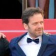 Présentation du film "Le Grand bain" au festival de Cannes